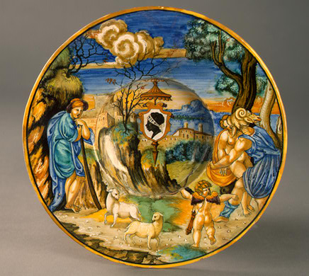 Céramique majolique de Francesco Xanto Avelli